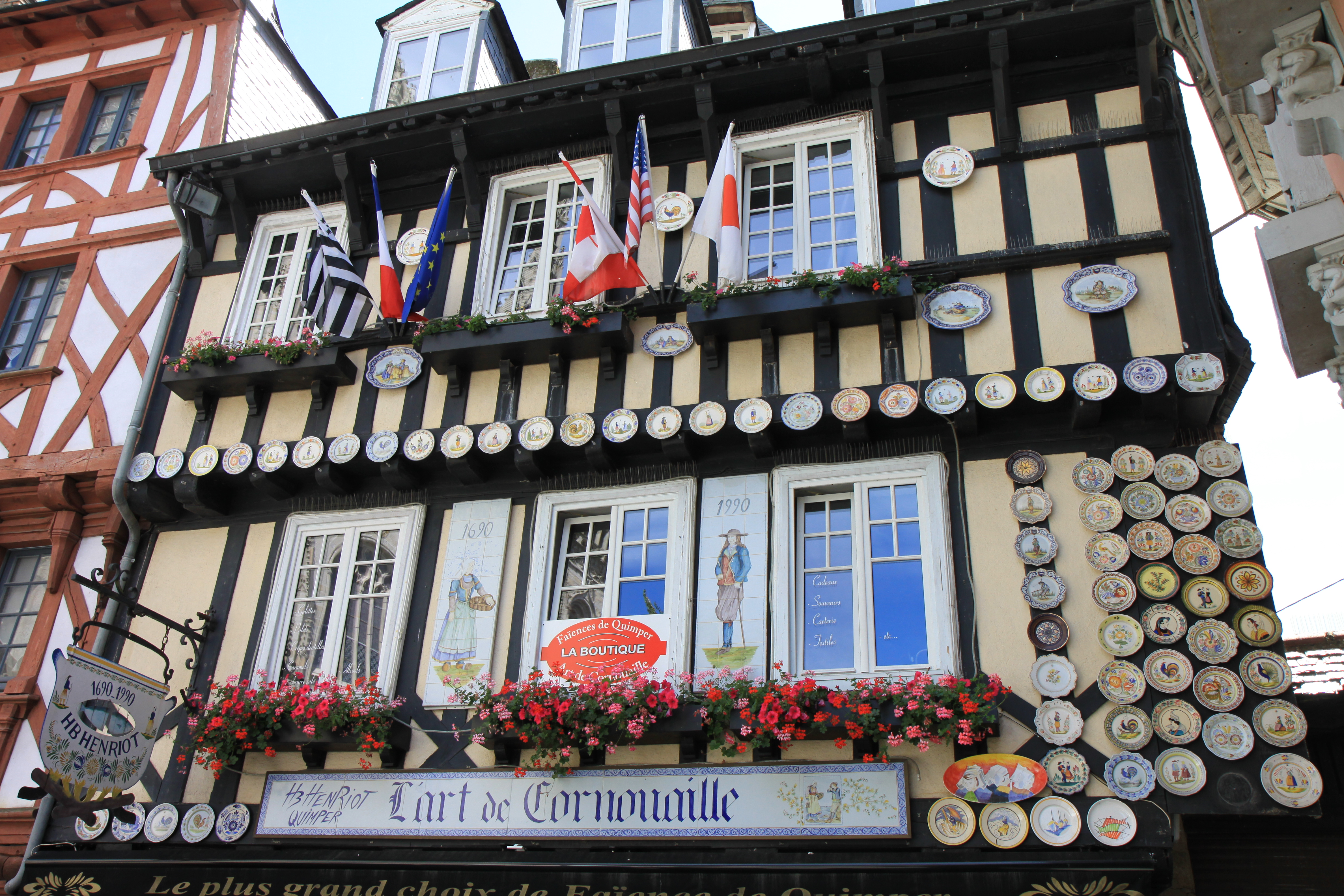 Façade de la faïencerie Henriot à Quimper.